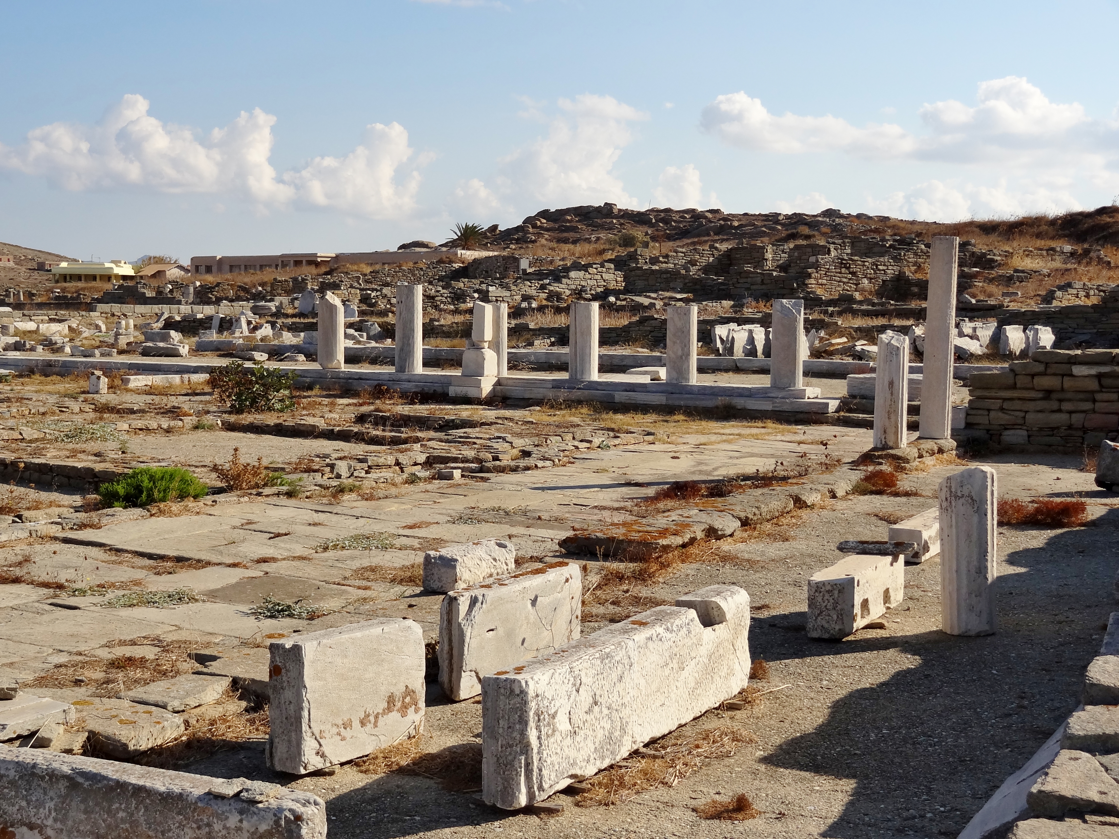 Agora der Delier in der Ausgrabungsstätte von Delos, Kykladen, Griechenland